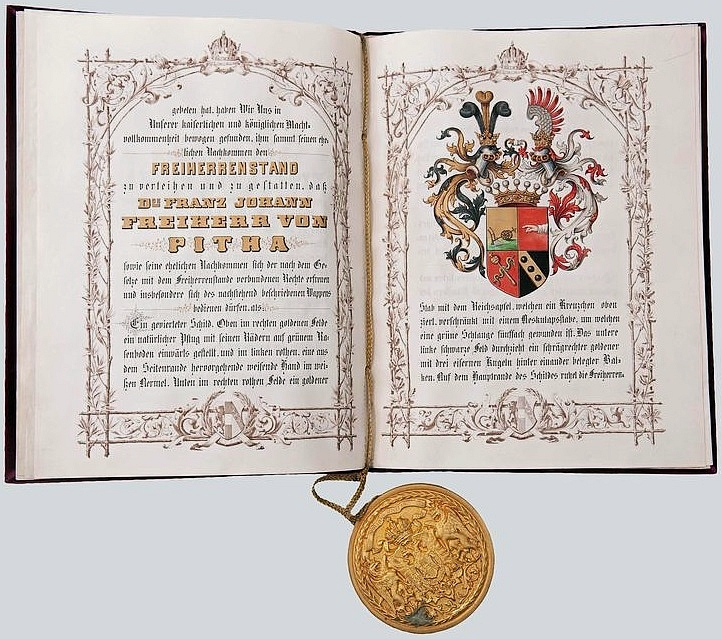 Freiherrenstandsdiplom von Franz Joseph I. (Kaiser von Österreich 1848-1916) für den Chirurgen und Militärmediziner Professor Dr. Franz Ritter von Pitha (1810-1875). Ausgestellt in Wien 1875, mit eigenhändiger Unterschrift des Kaisers, Gegenzeichnung Freiherr von Lassner-Zollheim. Pergamentlibell, teils goldgehöhte Kalligraphie, gedruckte Bordüre auf Veline, farbige Wappendarstellung. Violetter Samteinband mit in Gold aufgeprägtem Doppeladler, anhängendes Siegel in vergoldeter Siegelkapsel (auf dem Deckel das reliefierte kaiserliche Wappen). Aufbewahrungskassette (Format 31 x 53 cm) aus verzinntem Eisenblech.